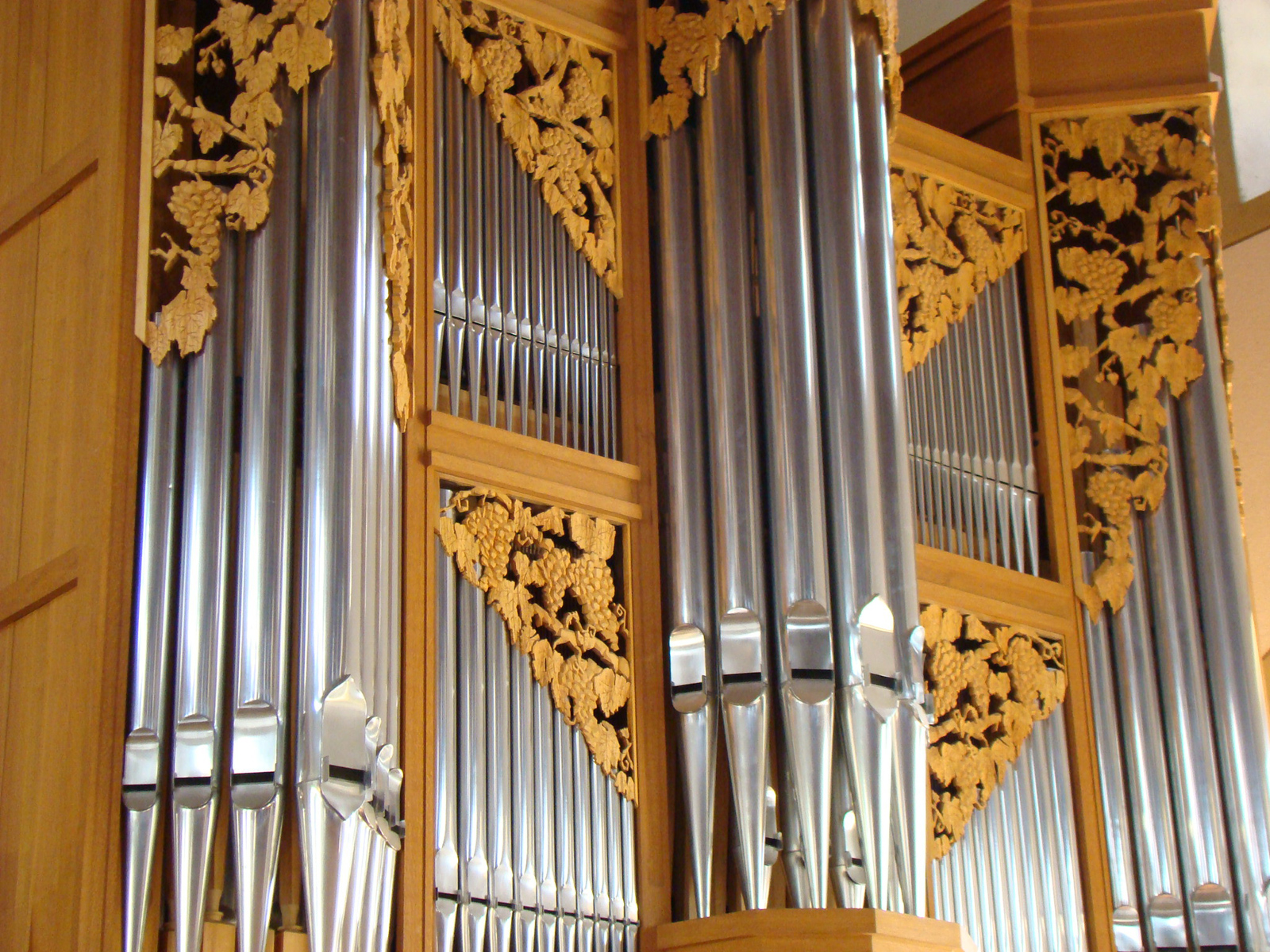 Orgelprospekt der Rensch-Orgel in der Nordheimer Bartholomäuskirche